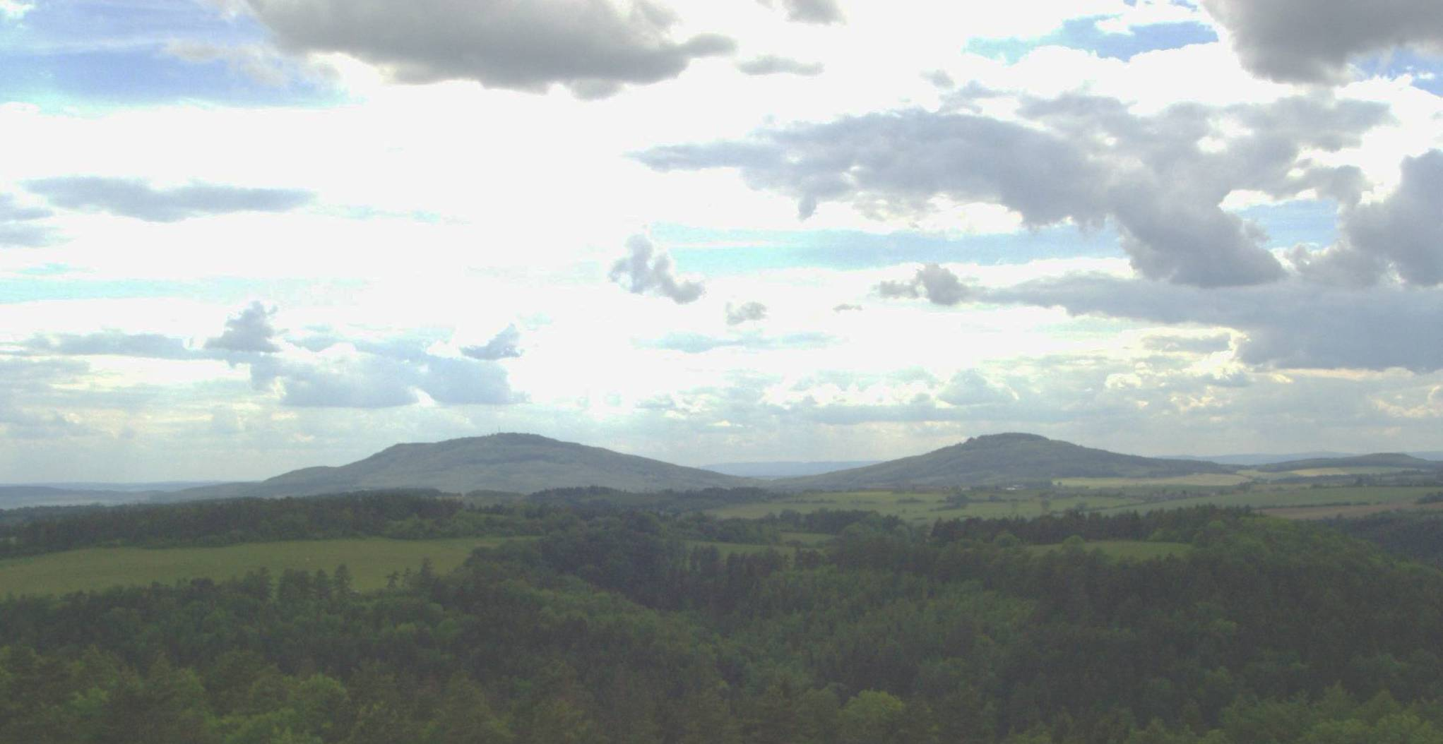 Großer (679m) und kleiner (641m) Gleichberg vom Hildburghäuser Stadtberg aus, Thüringen, Deutschland